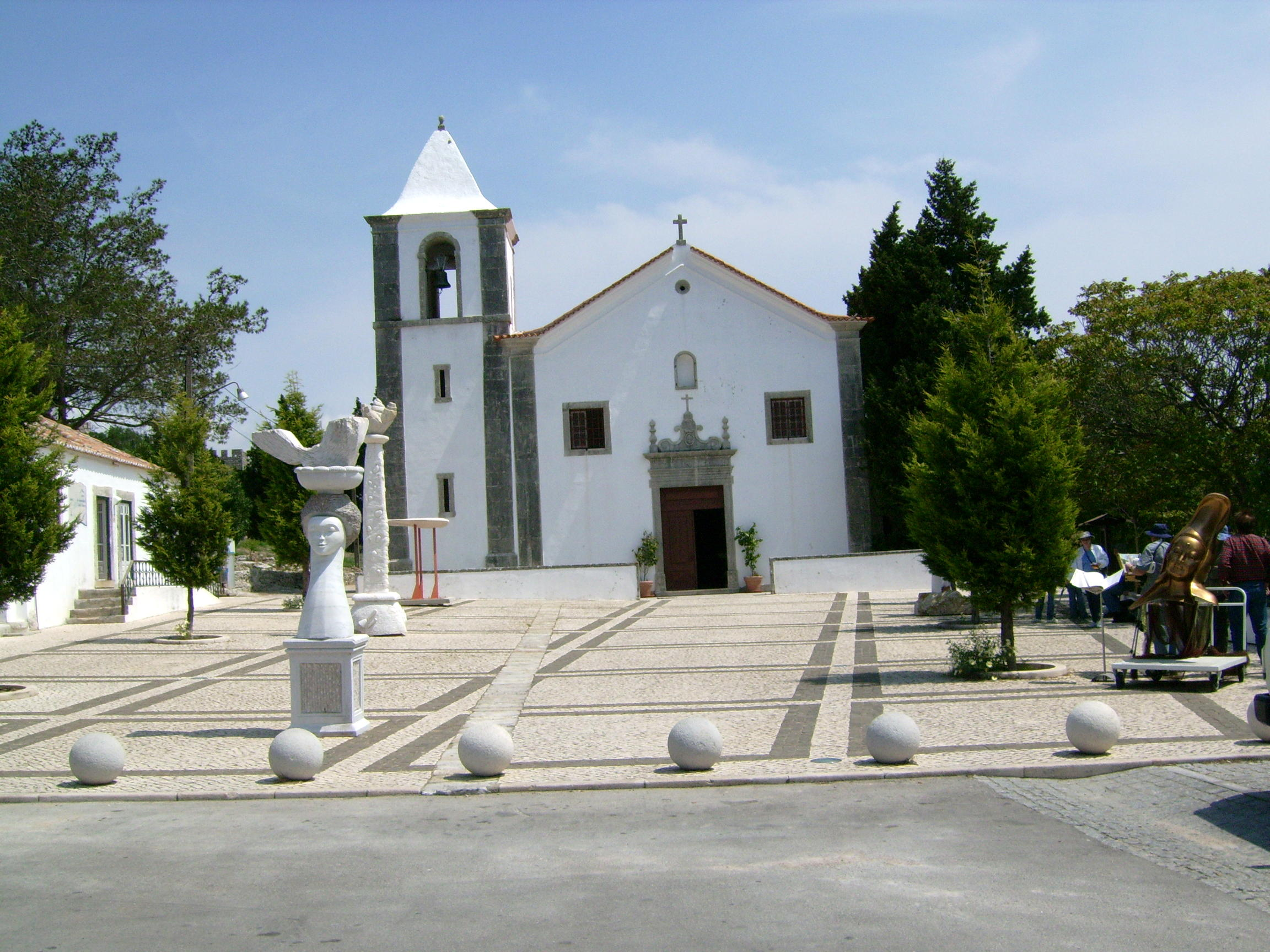 Igreja de Nossa Senhora do Castelo Cabo Espichel - Sesimbra - Portugal user:sacavem (pt) (usuário:sacavem)